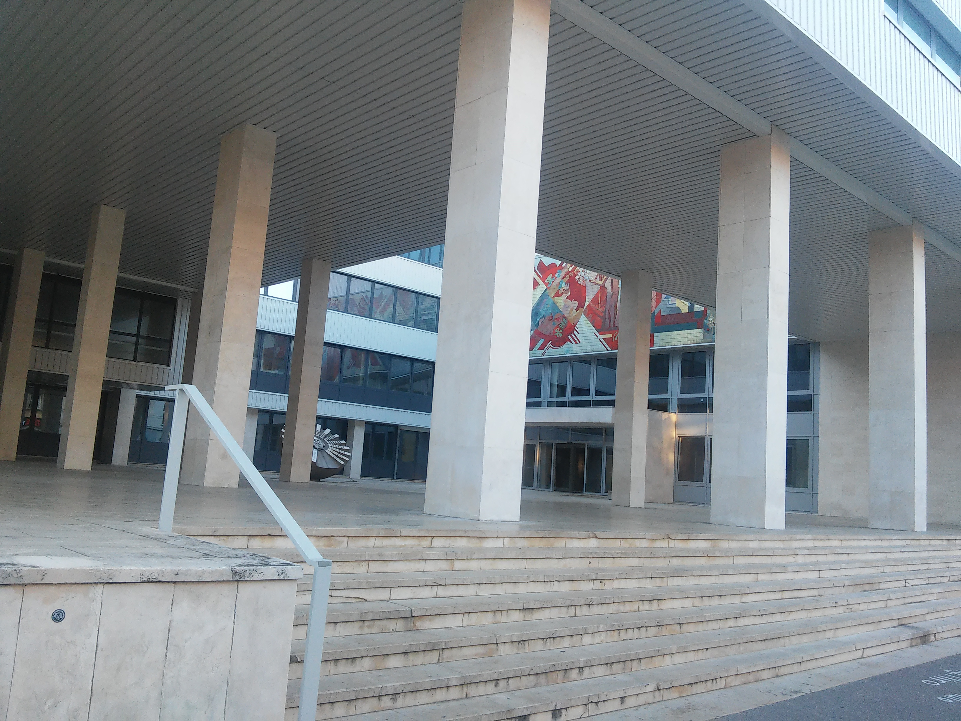 Radlinského 9, Bratislava